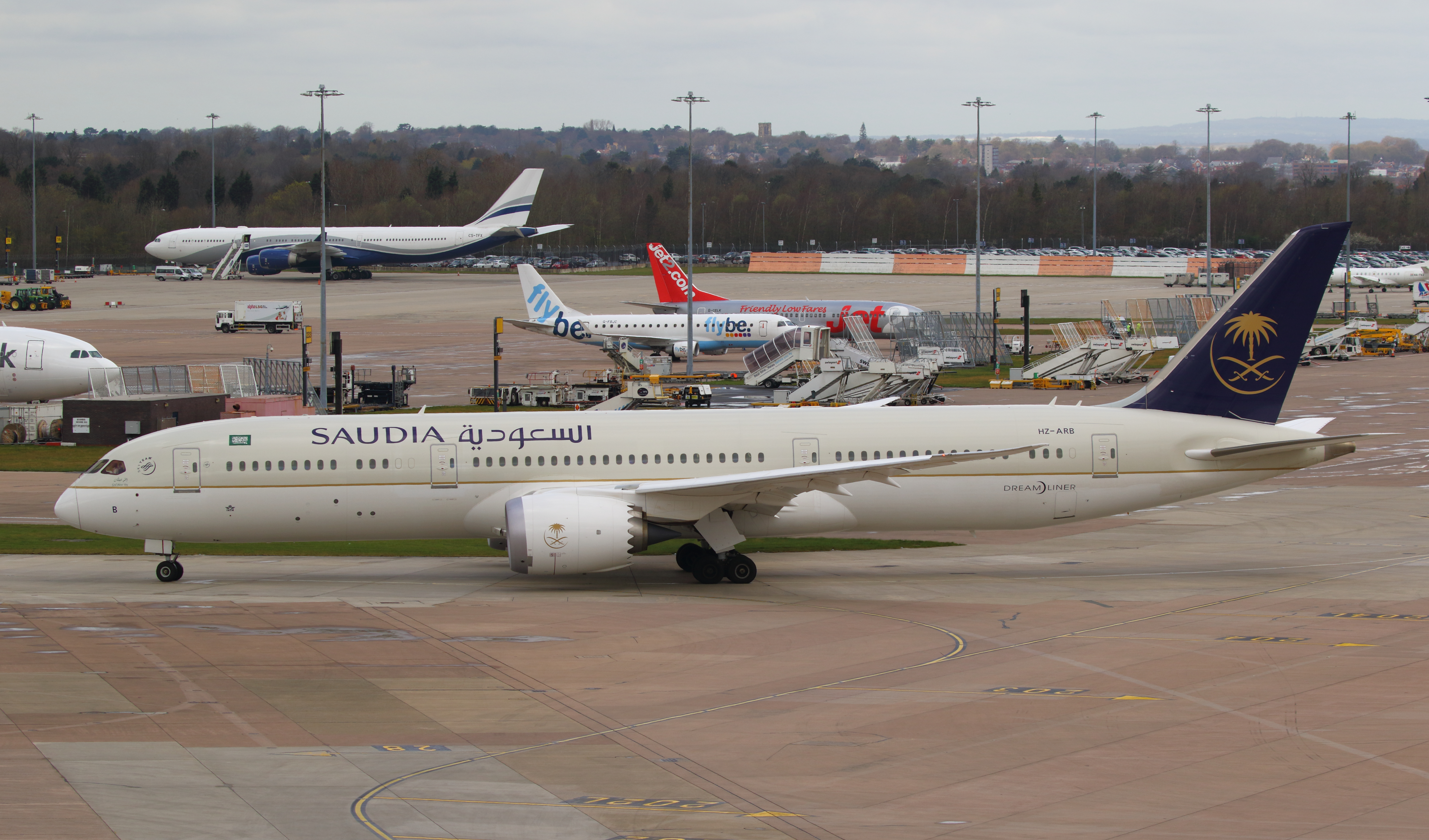 Manchester 05.0416.